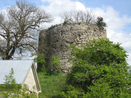 ბოჭორმის ცილინდრული კოშკი